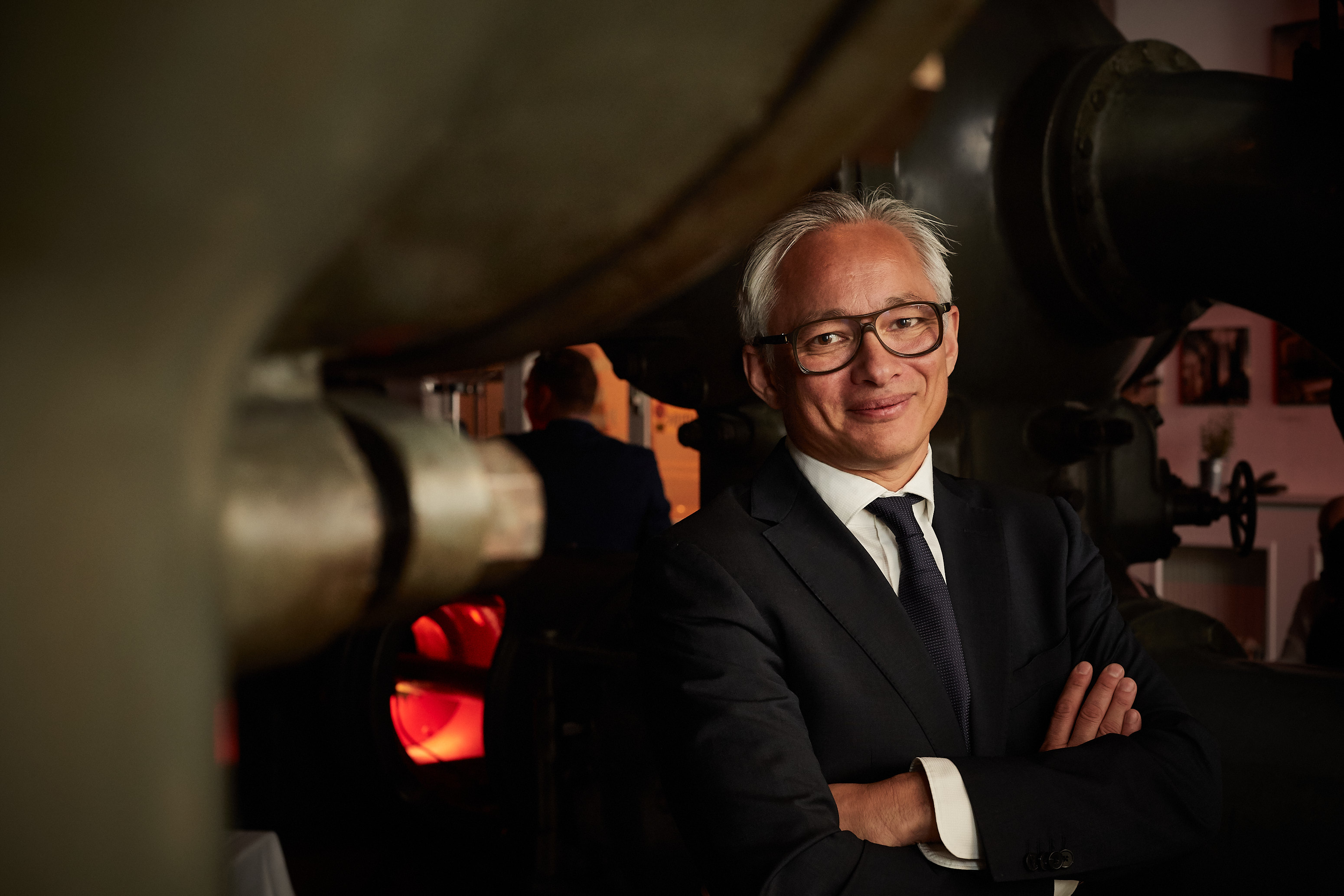 Torsten Liem beim 20.-jährigem Jubiläum der Osteopathie Schule Deutschland (OSD) in Berlin